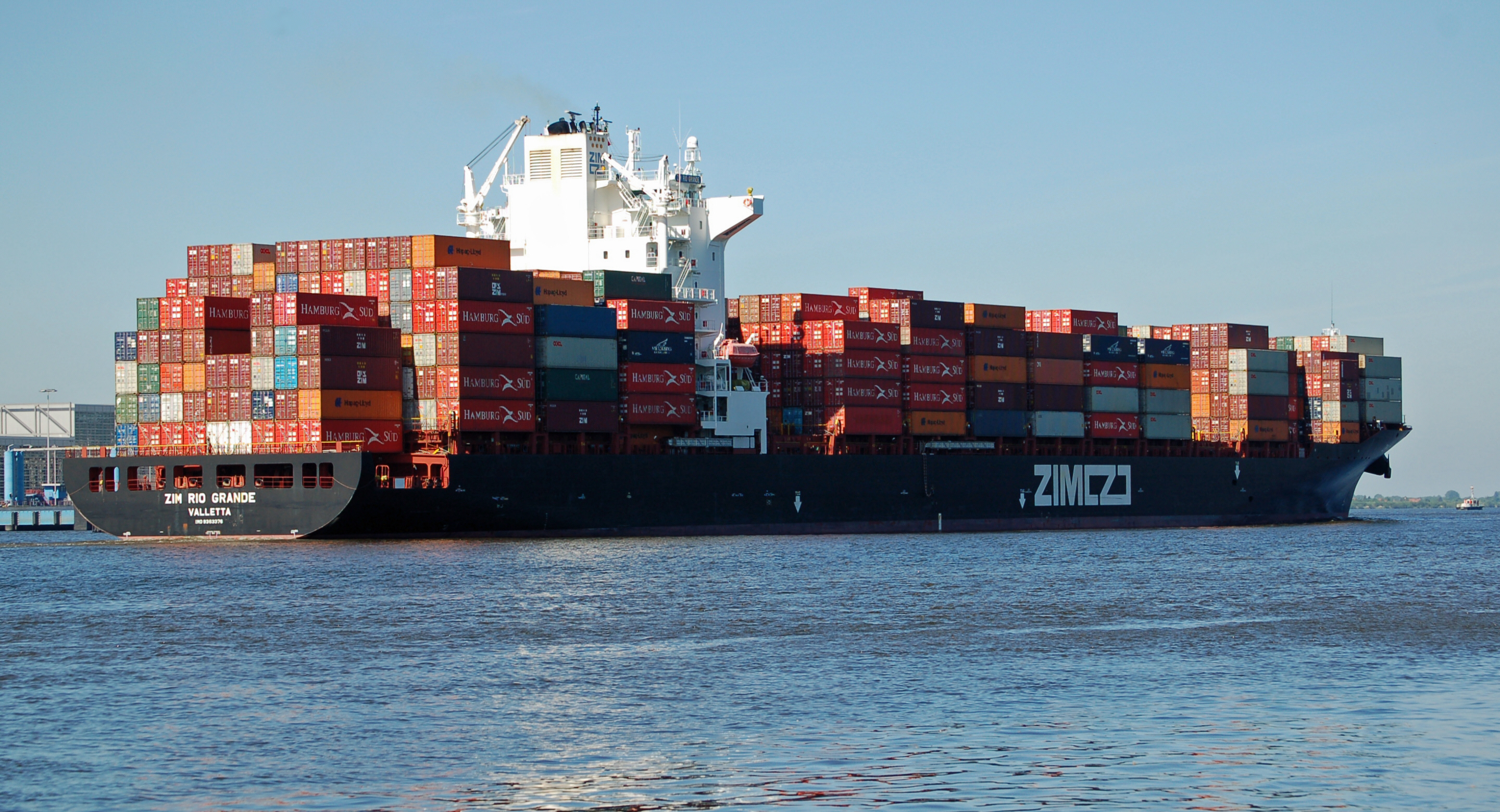 Das Frachtschiff ZIM Rio Grande auf der Elbe. IMO-Nummer: 9363376 MMSI-Nummer: 249253000 Rufzeichen: 9HNV9 Länge: 260.om Breite: 32.0m Flagge: Malta